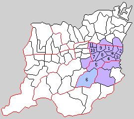 徳島県名東郡の町村制時点の町村。